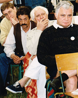 Gyurcsány Ferenc, Galkó Balázs, Jancsó Miklós és Kéri László hallgatják a hozzászólókat - Szárszói Találkozó 1999